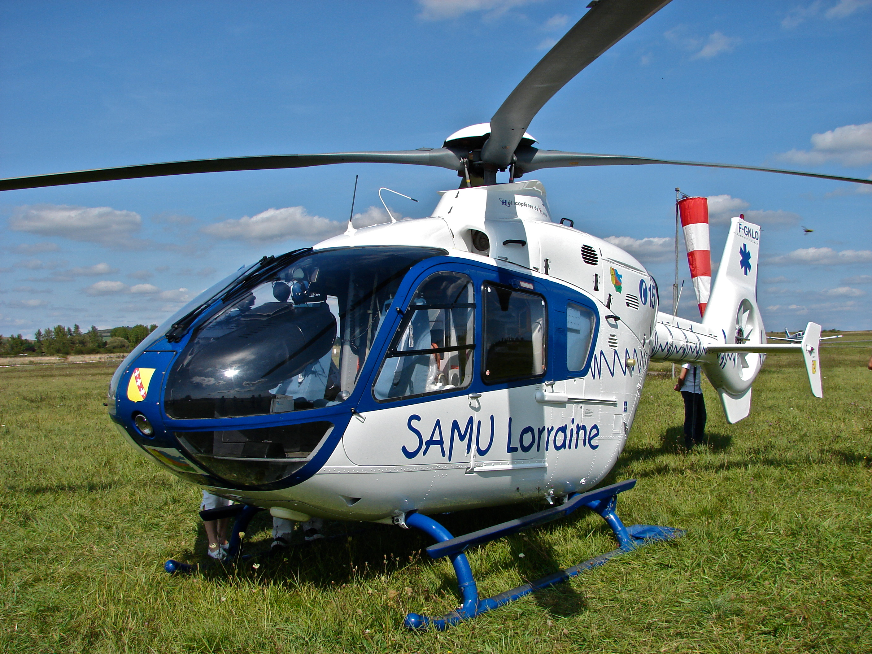 SAMU (Helicopteres de France) F-GNLO (cn 0005) Nancy - Essey (ENC / LFSN)